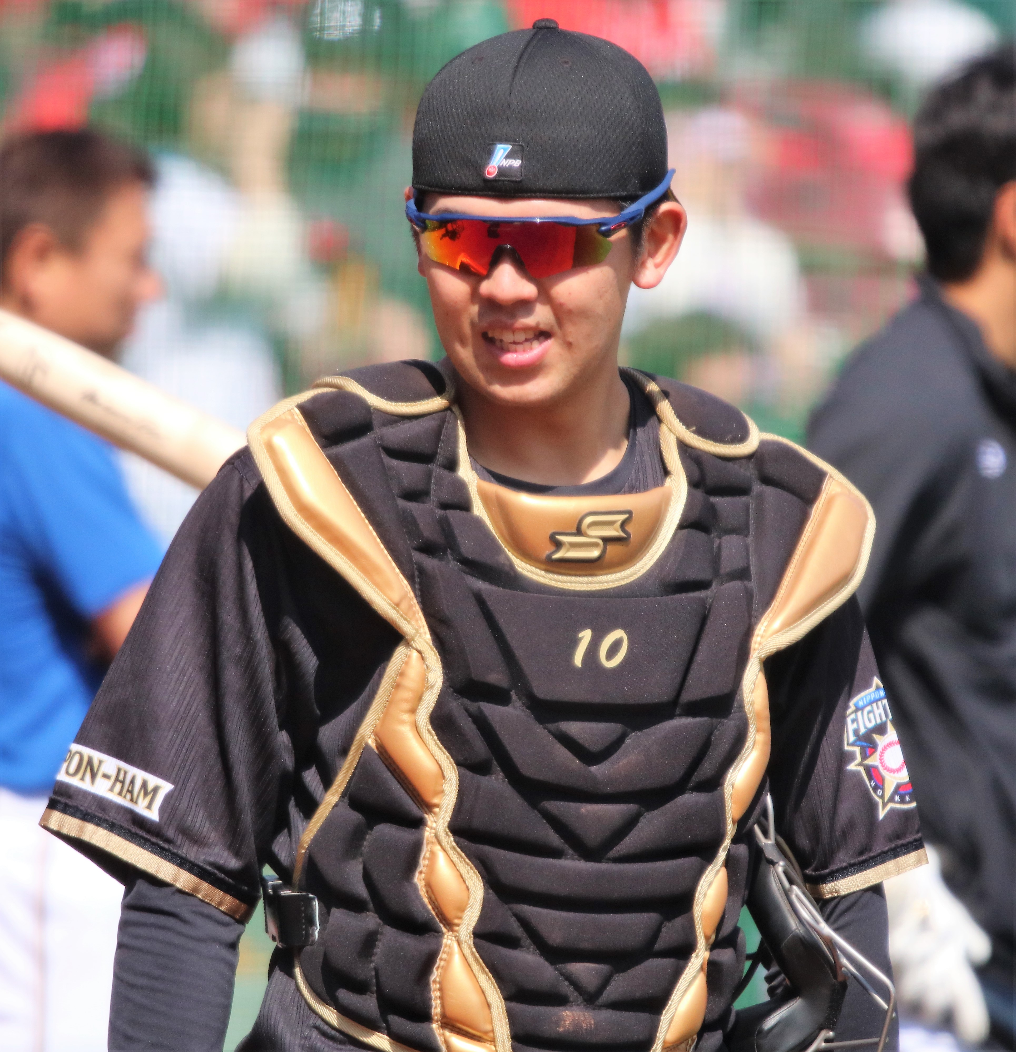 2018年3月13日マツダスタジアム